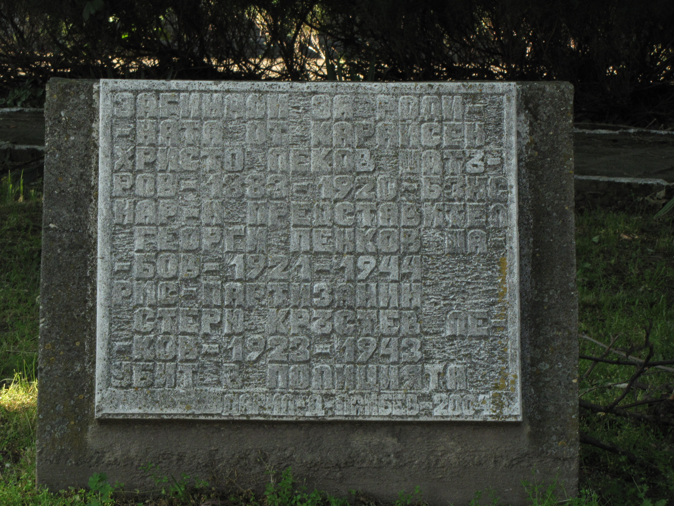 Плоча на убити и загинали жертви в центъра на с. Караисен